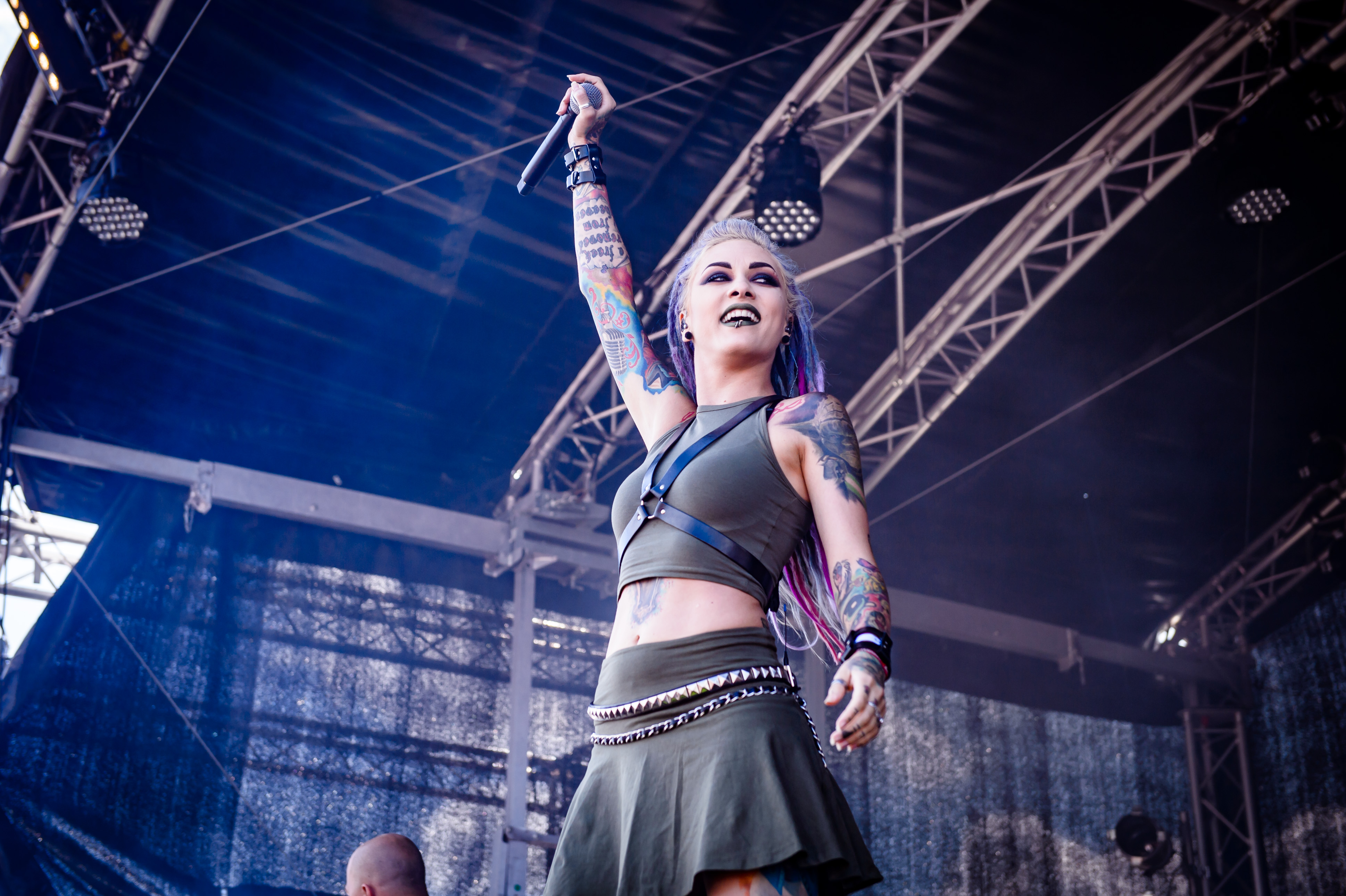 'Summer Breeze Festival 2017; Dinkelsbühl': 'Infected Rain'